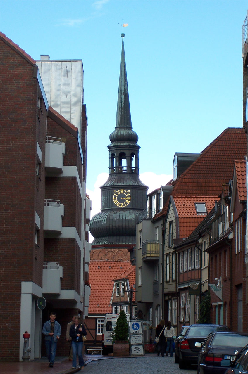 Stade, Turmhelm (1682-84) der Kirche St. Cosmae (13.Jh), heute ein Wahrzeichen der Stadt